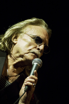 Christophe à la Fiesta des Suds à Marseille en 2009